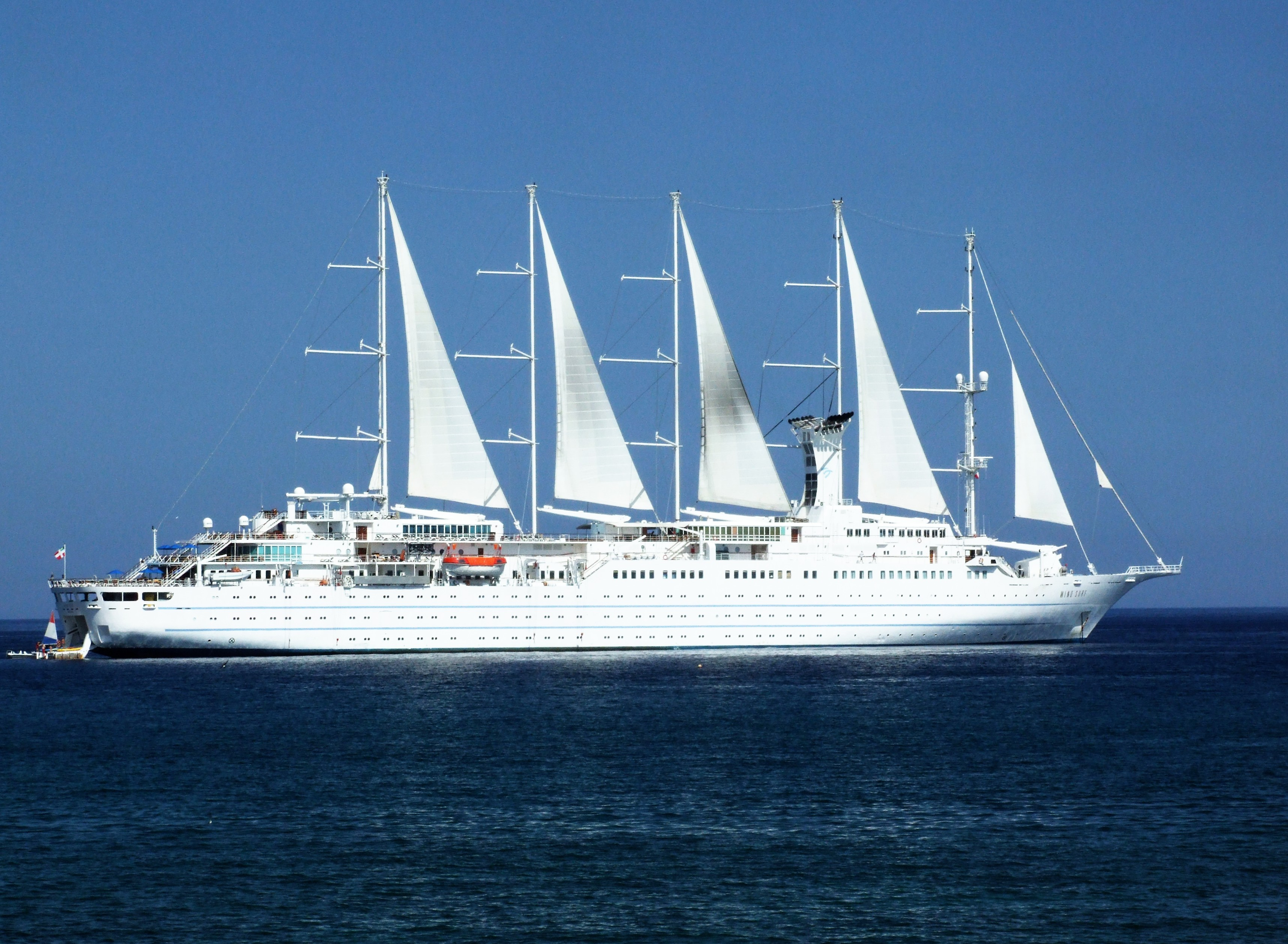 Club Med 2 in Giardini-Naxos